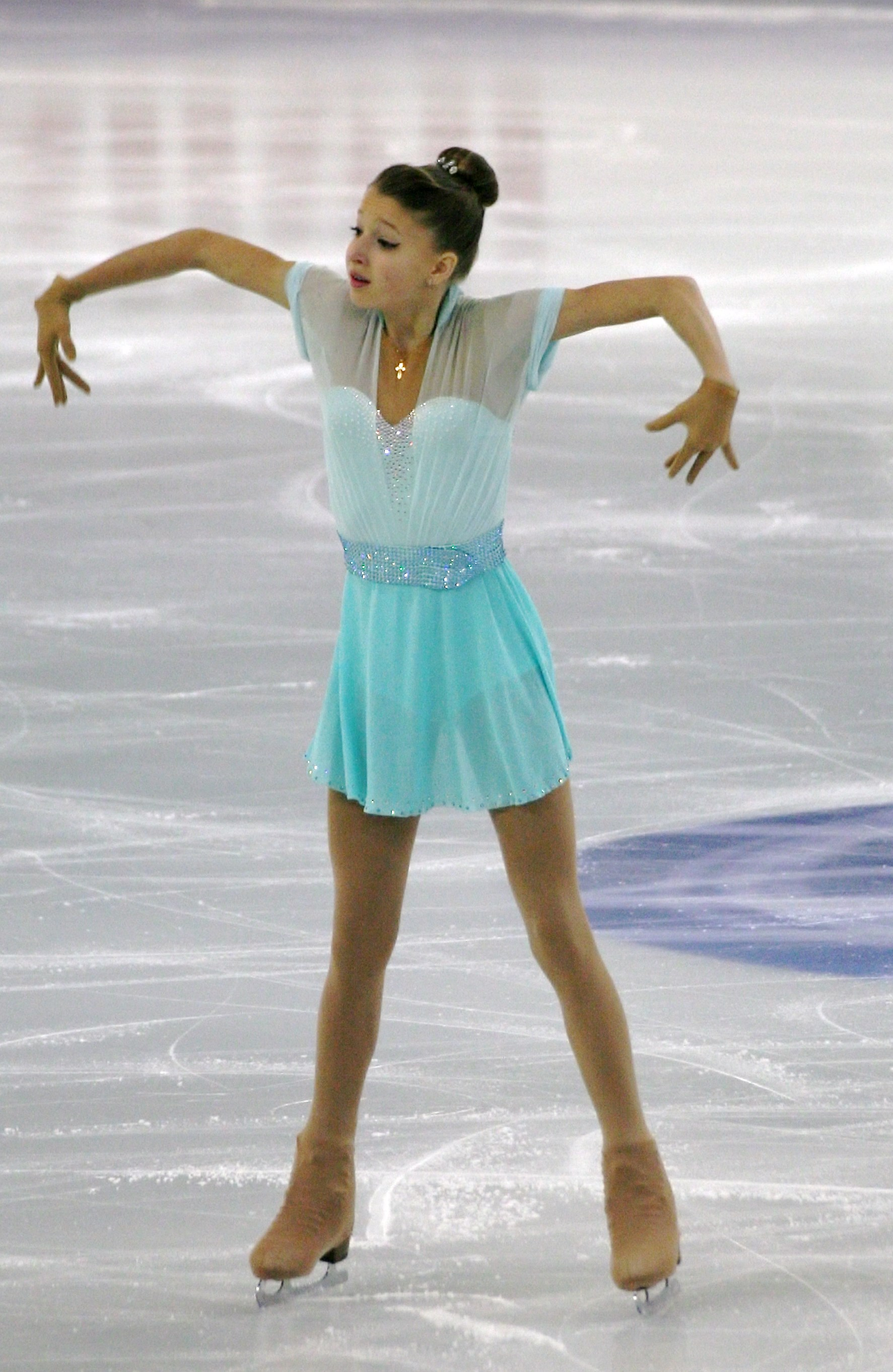 Мария Сотскова (Россия) на финале Гран-при по фигурному катанию среди юниоров 2014-2015.